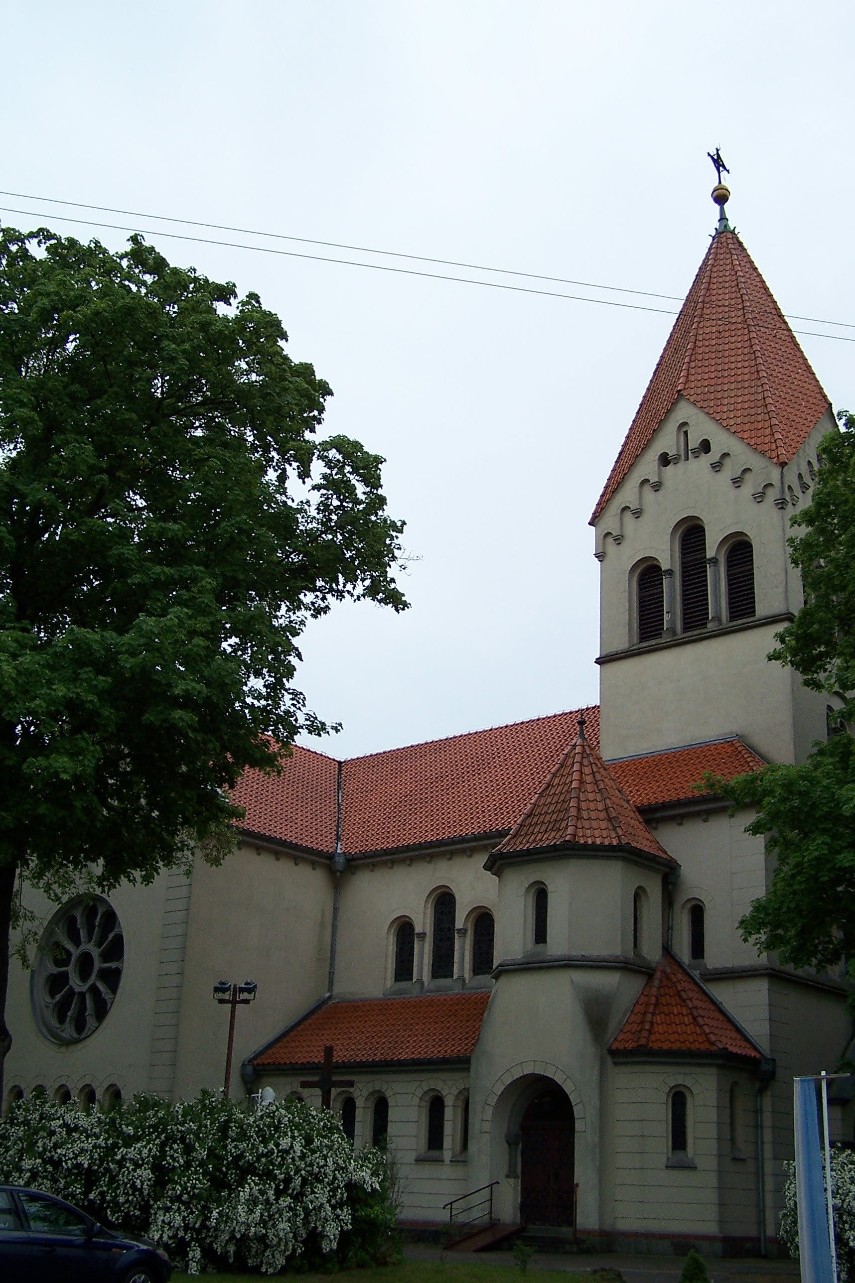 Kościół pw. św. Floriana w Wirach (gmina Komorniki)